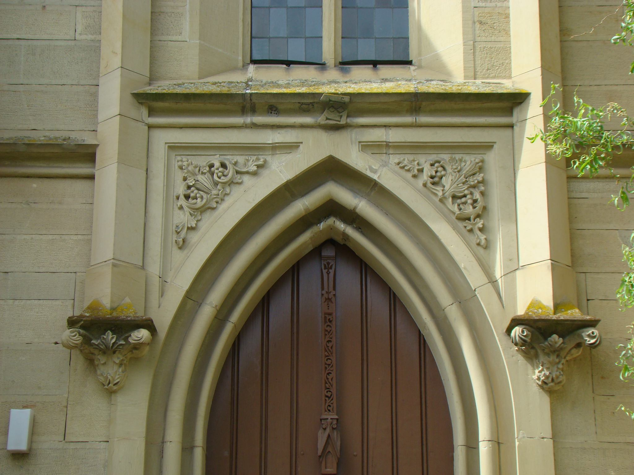 Evangelische Kirche Fürfeld